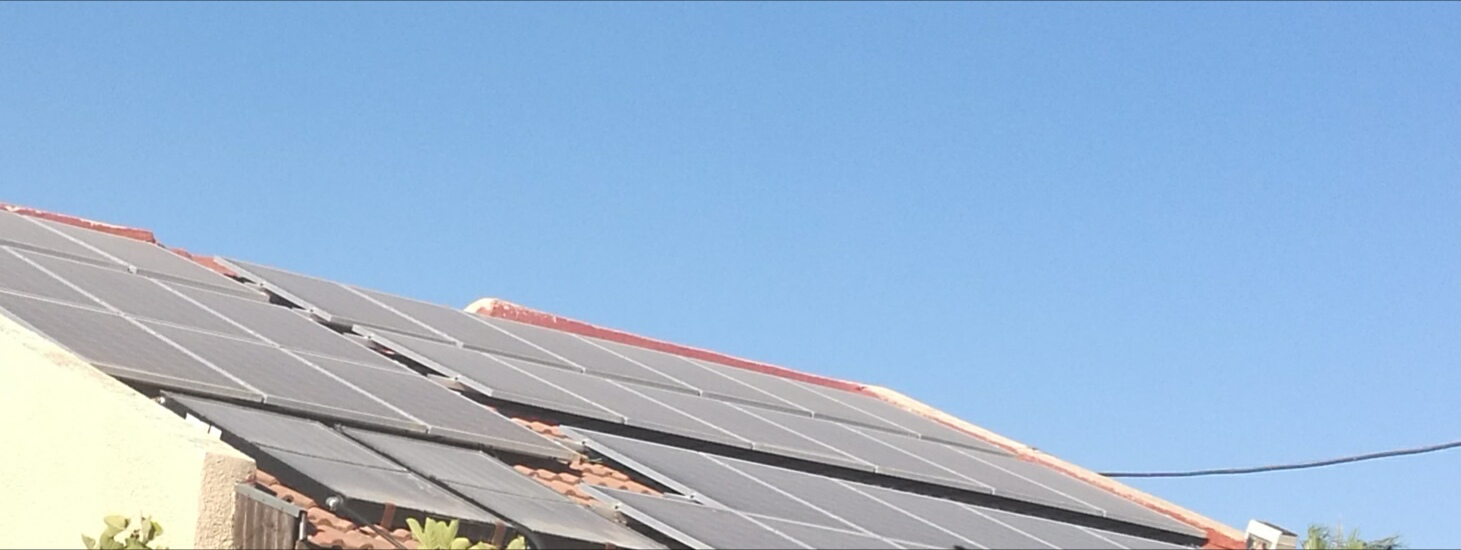 קולטים סולאריים על גג של בית פרטי